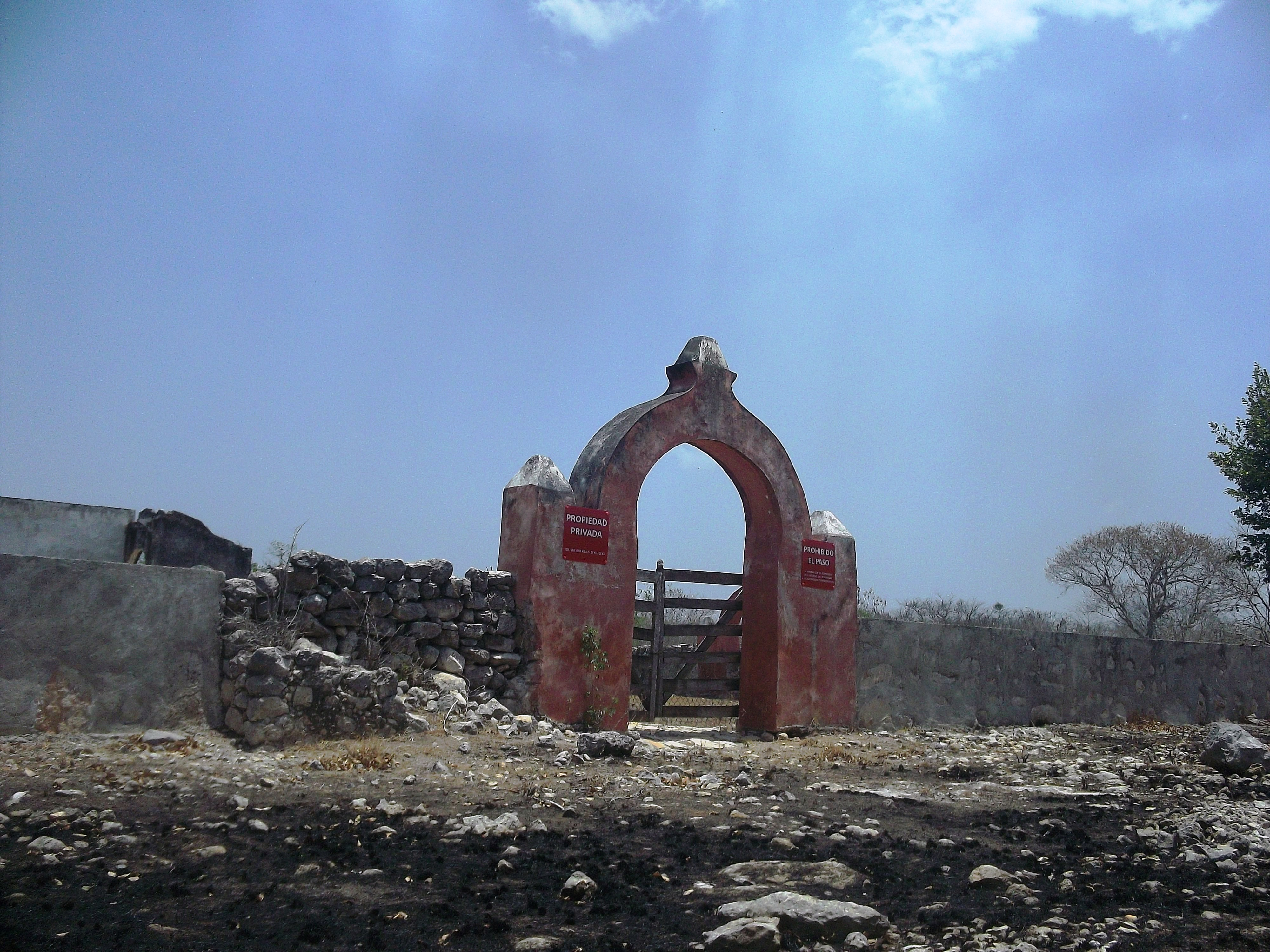 Hacienda San José Kibá, Yucatán.